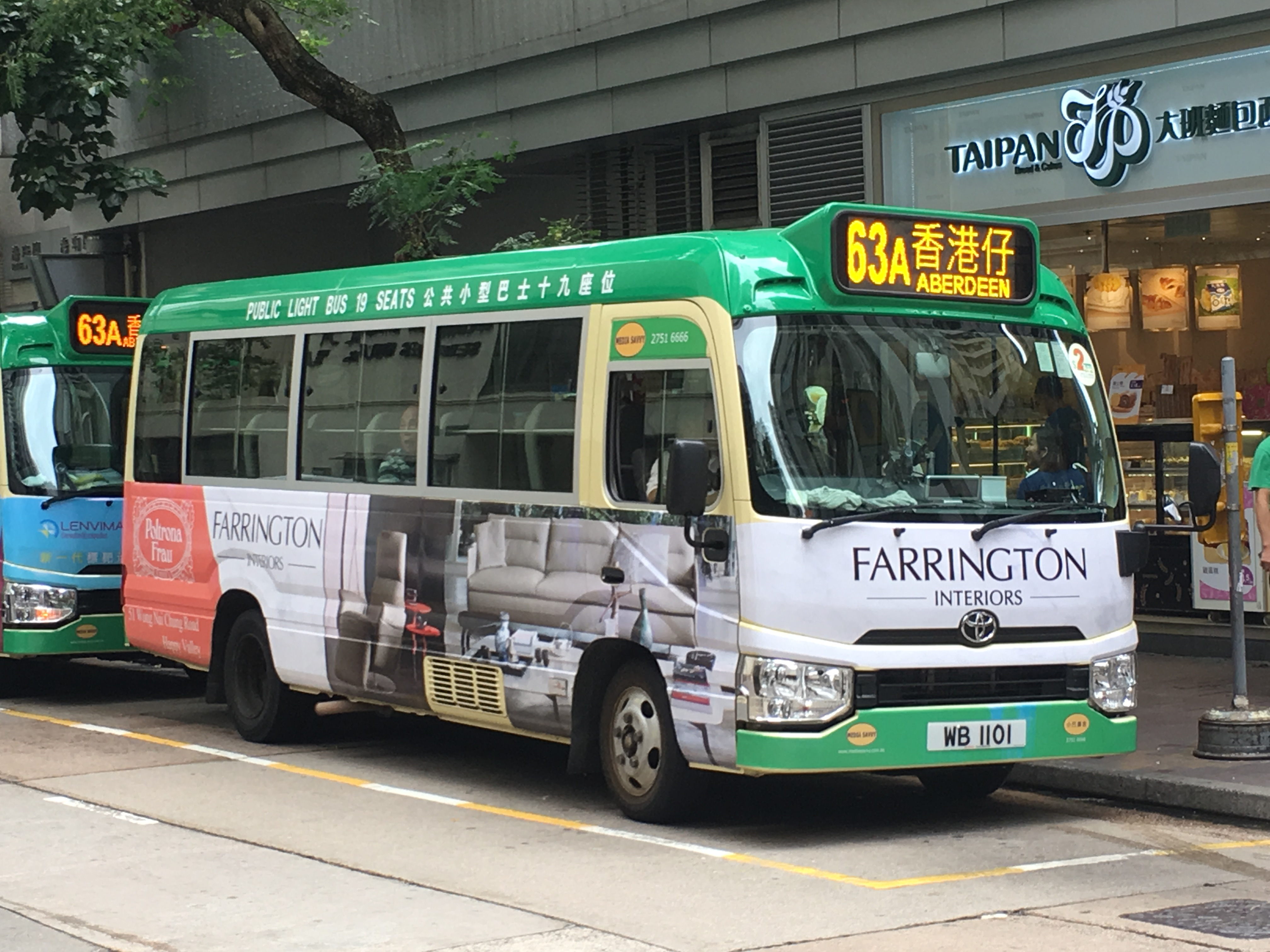 中文（香港）: This photo is taken in Aberdeen.